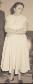 Deputada Estadual de São Paulo Tereza Delta com uma comissão de funcionários do Departamento Estadual de Rodagem (DER), sobre a greve de fome dos trabalhadores do Departamento na via Anchieta, que estavam com 4 meses de atraso salarial, em 15 de dezembro de 1953